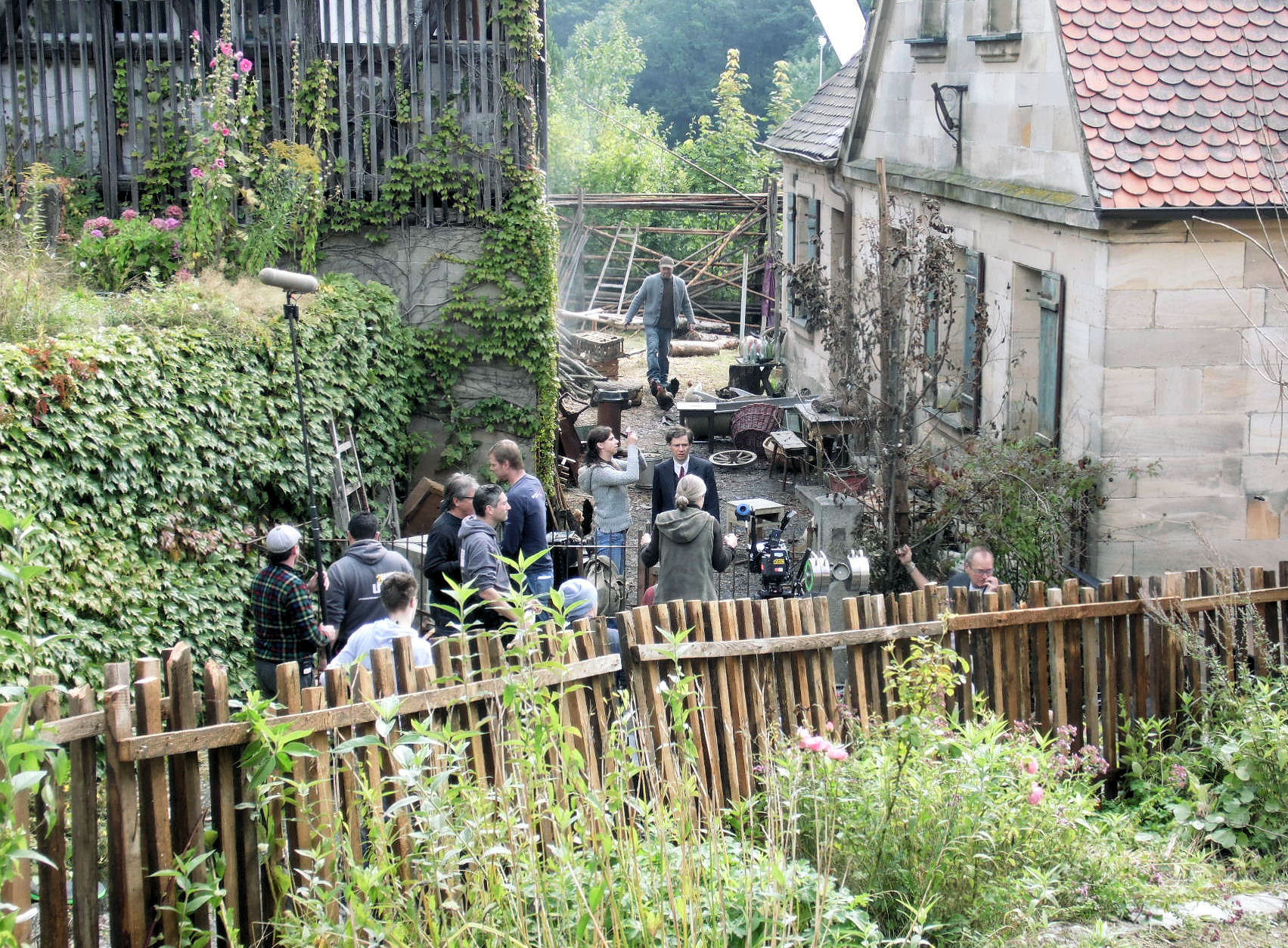 Aufnahme 3 zum Elser-Film in Weidenberg